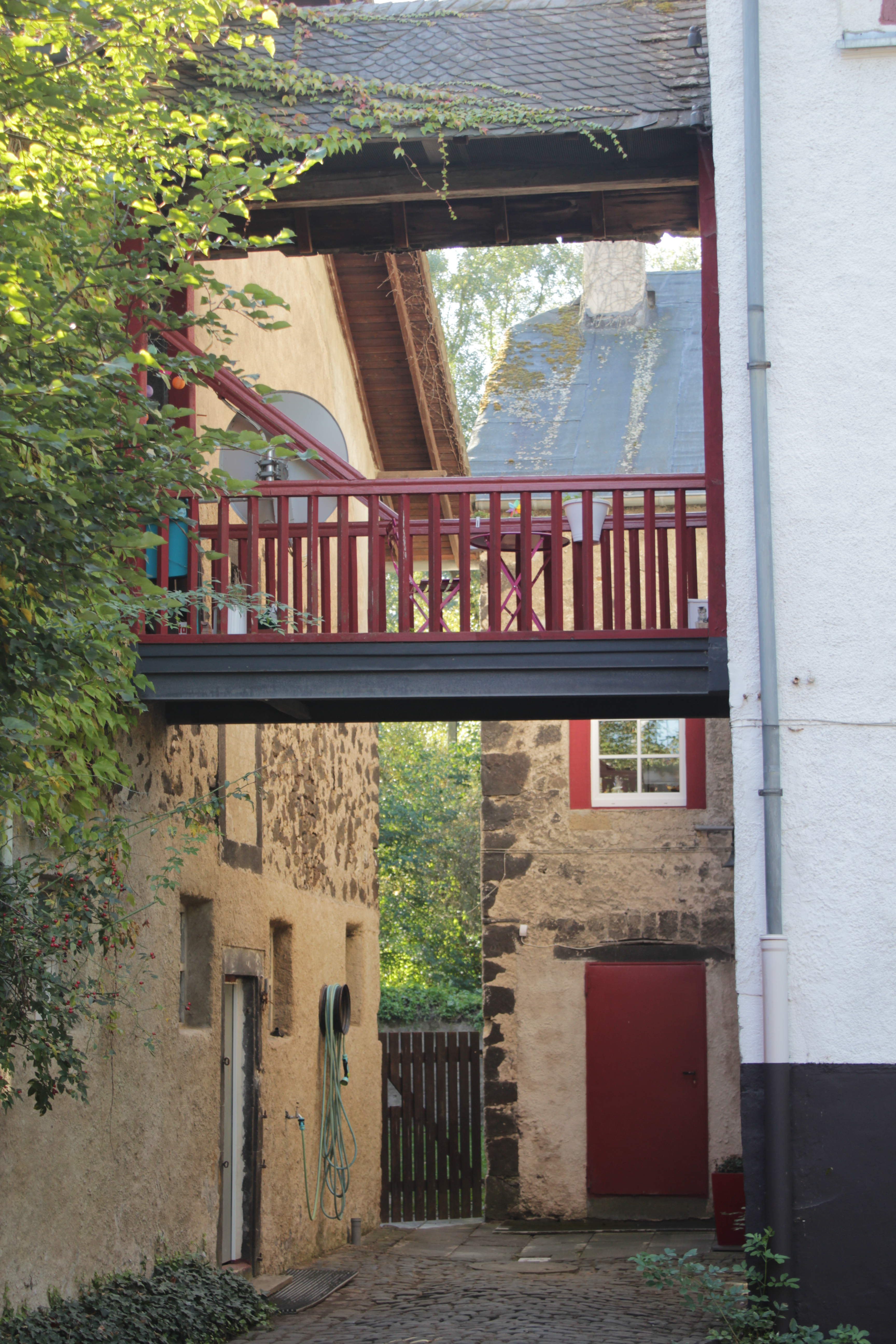 Lukasmühle - Durchgang neben dem Hauptgebäude